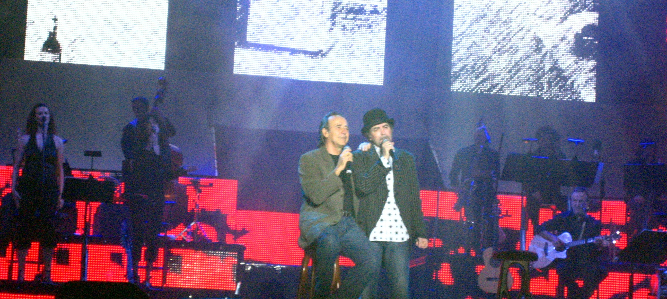 Joan Manuel Serrat & Joaquin Sabina; gira Dos Pájaros de un Tiro; Terrassa (Barcelona, Catalonia, Spain)